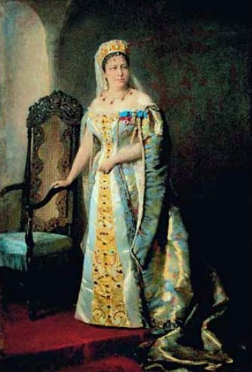 Екатерина Дмитриевна Всеволожская, ур. cветлейшая княжна Волконская (1846—1898)